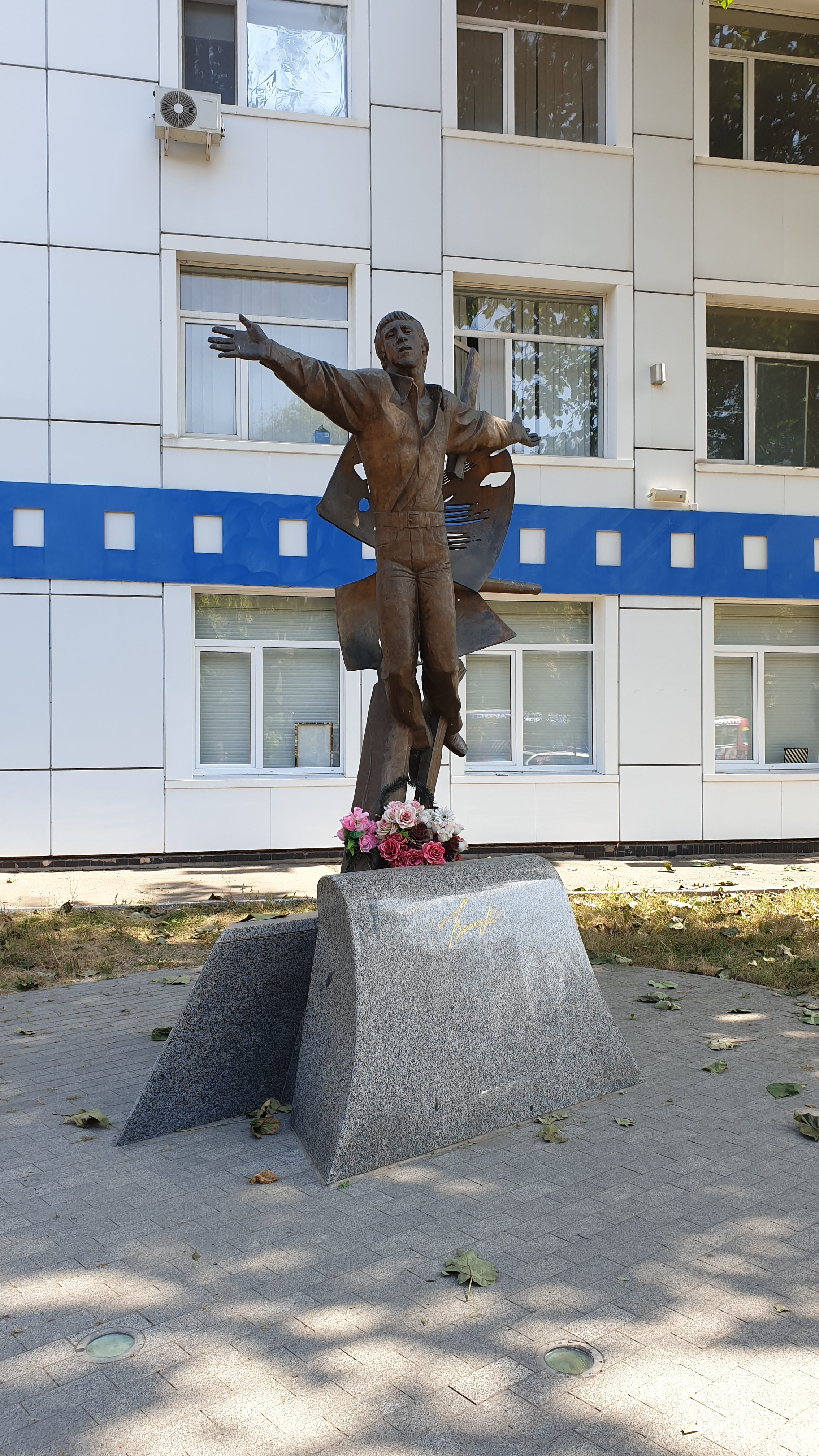 памятник